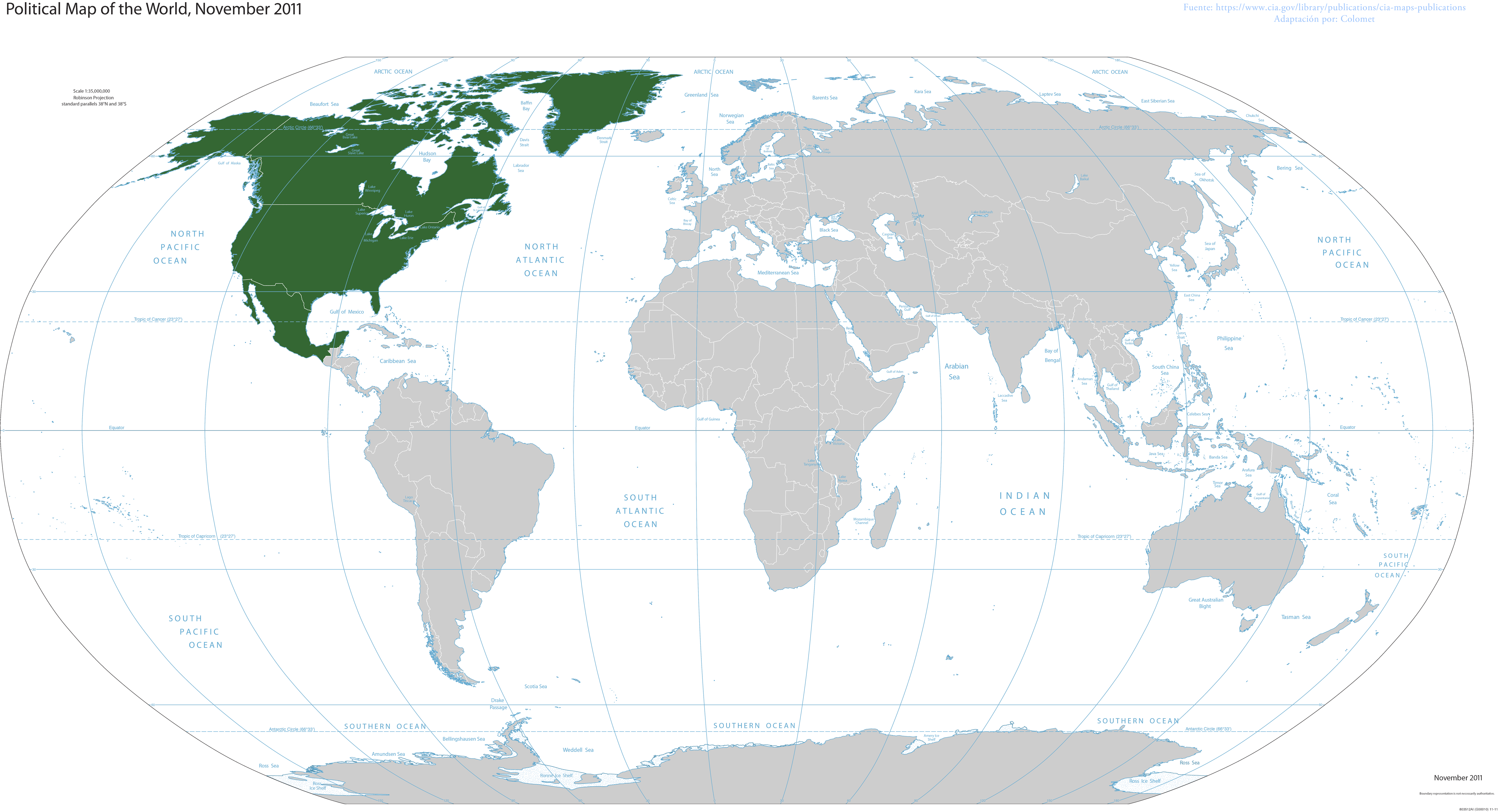 Mapa de America del Norte